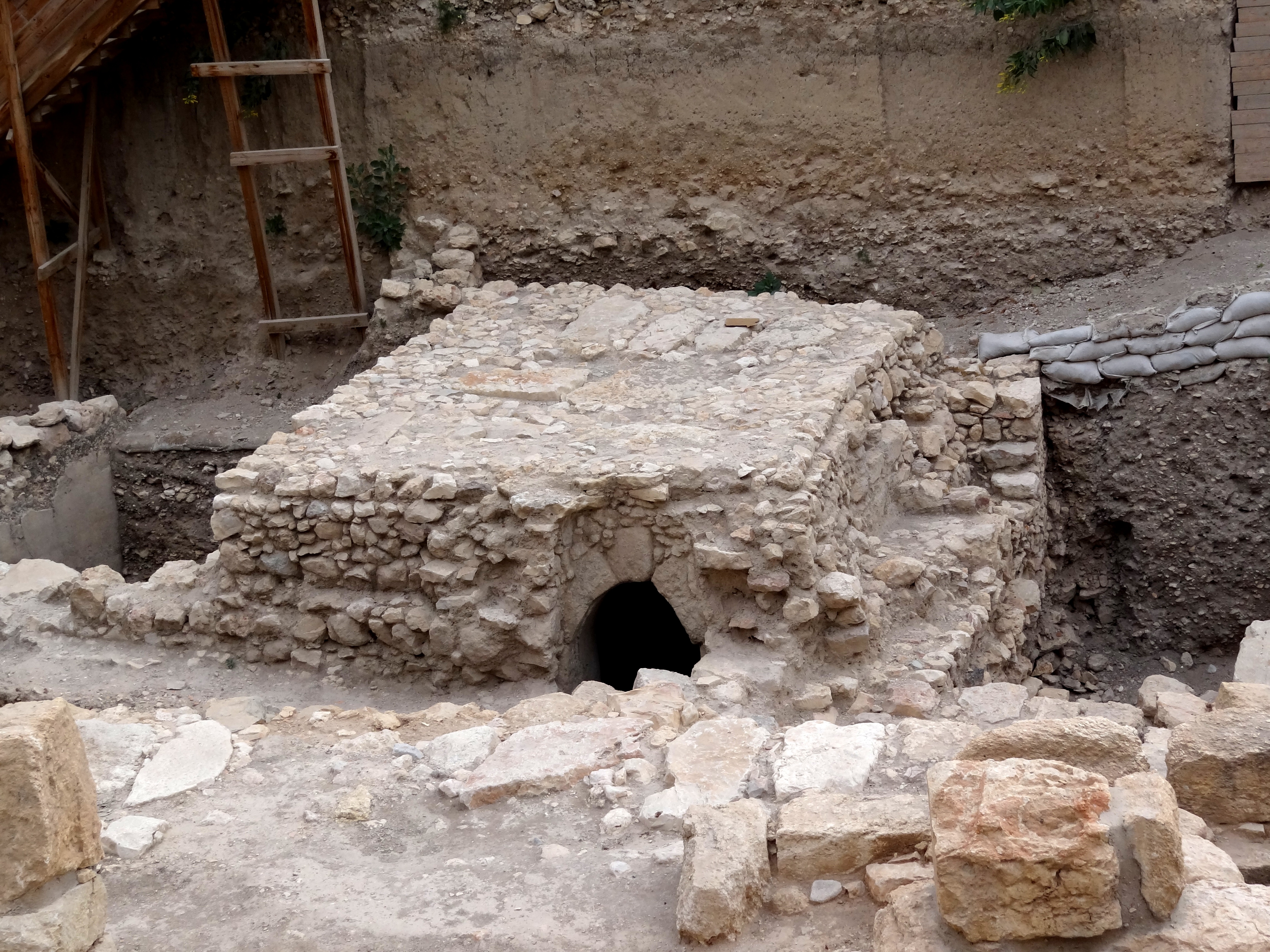 Excavation in City of David Givaty parking lot Jerusalem, Israe, status on October 12, 2011 חניון גבעתי בעיר דוד הינו חלק מהאתר הארכאולוגי עיר דוד. החפירות באתר זה החלו בחודש מרץ 2007. זו אחת מהחפירות הארכאולוגיות החשובות הנעשות בתחום עיר דוד שבשכונת סילואן בירושלים. הארכאולוגים האחראים הם דורון בן עמי ויאנה צ'חנוביץ תמונות שצולמו ב- 12 באוקטובר 2011 בור המים שהשתייך לקומפלקס של שלהי בית שני ושולה מחדש בוילה הרומית. מבט ממערב